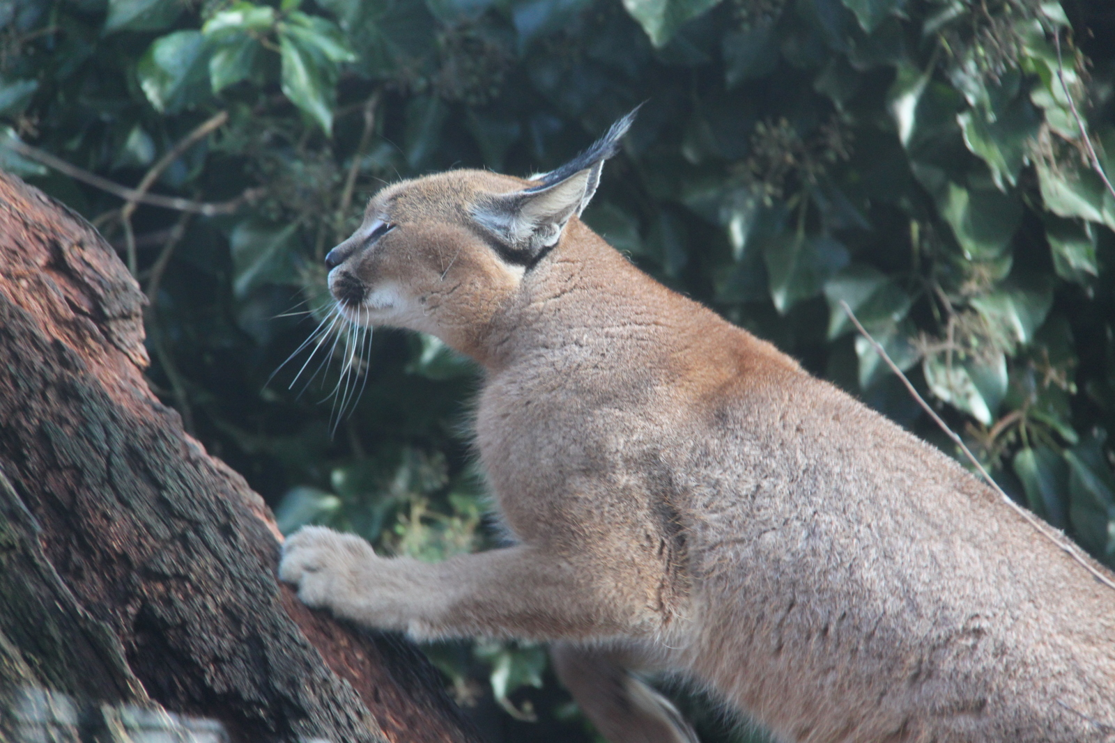 20120219 Olmense Zoo